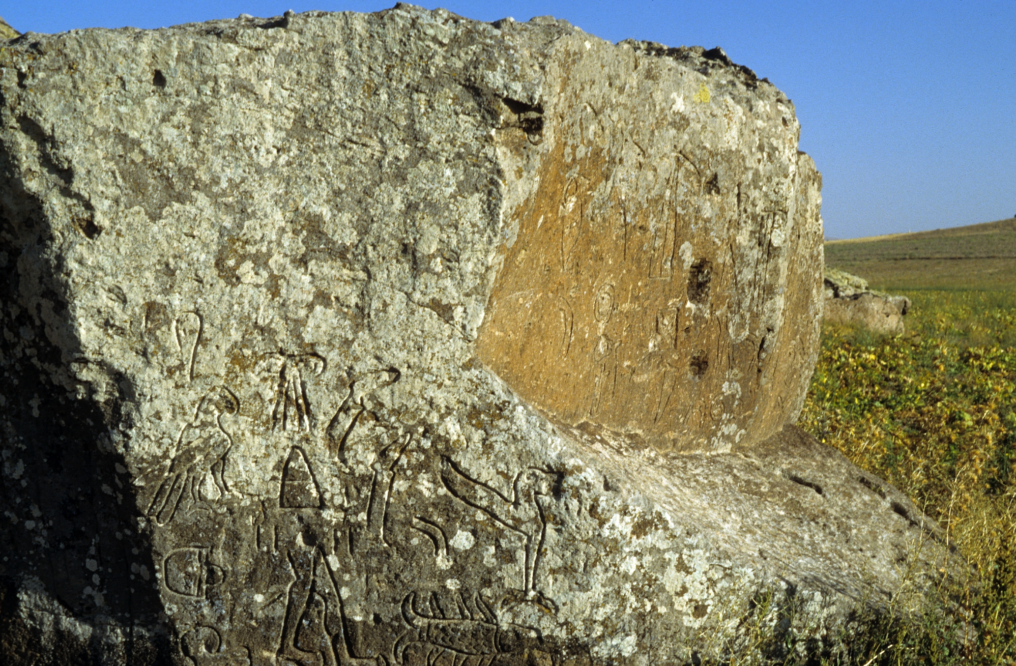 Inschriftenstein von Suvasa mit hethitischen Hieroglyphen in der Nähe von Gülsehir, Kappadokien, Zentraltürkei